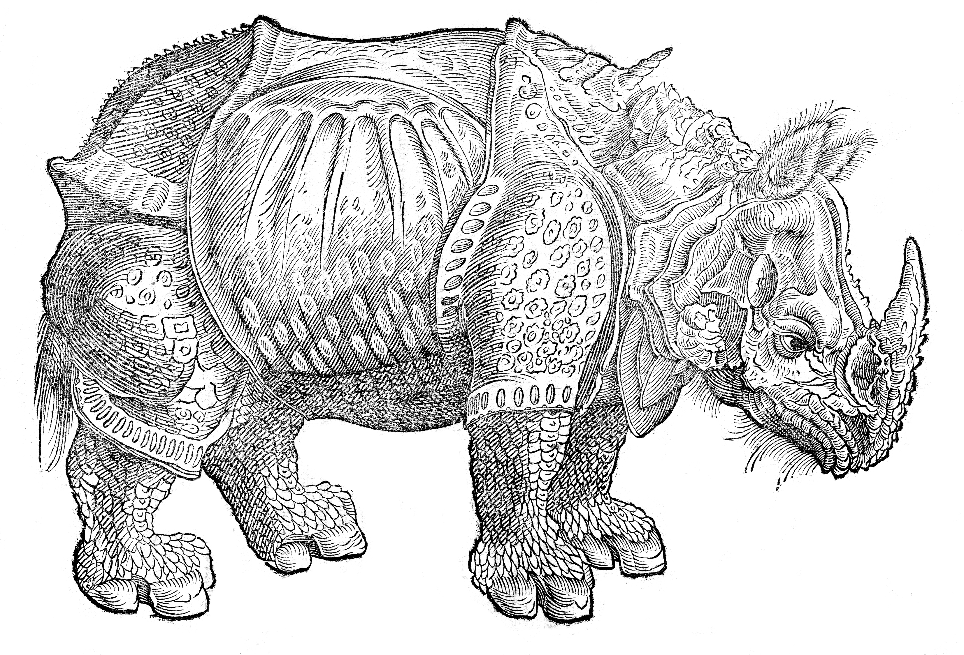 RINOCERONTE (da Ulisse Aldovrandi, Quadropedum omnium bisulcorum historia, Bologna: Sebastiano Bonomi e Gerolamo Tamburini, 1621). Illustrazione per il Colouring Book della Biblioteca comunale di Trento (dicembre 2016)